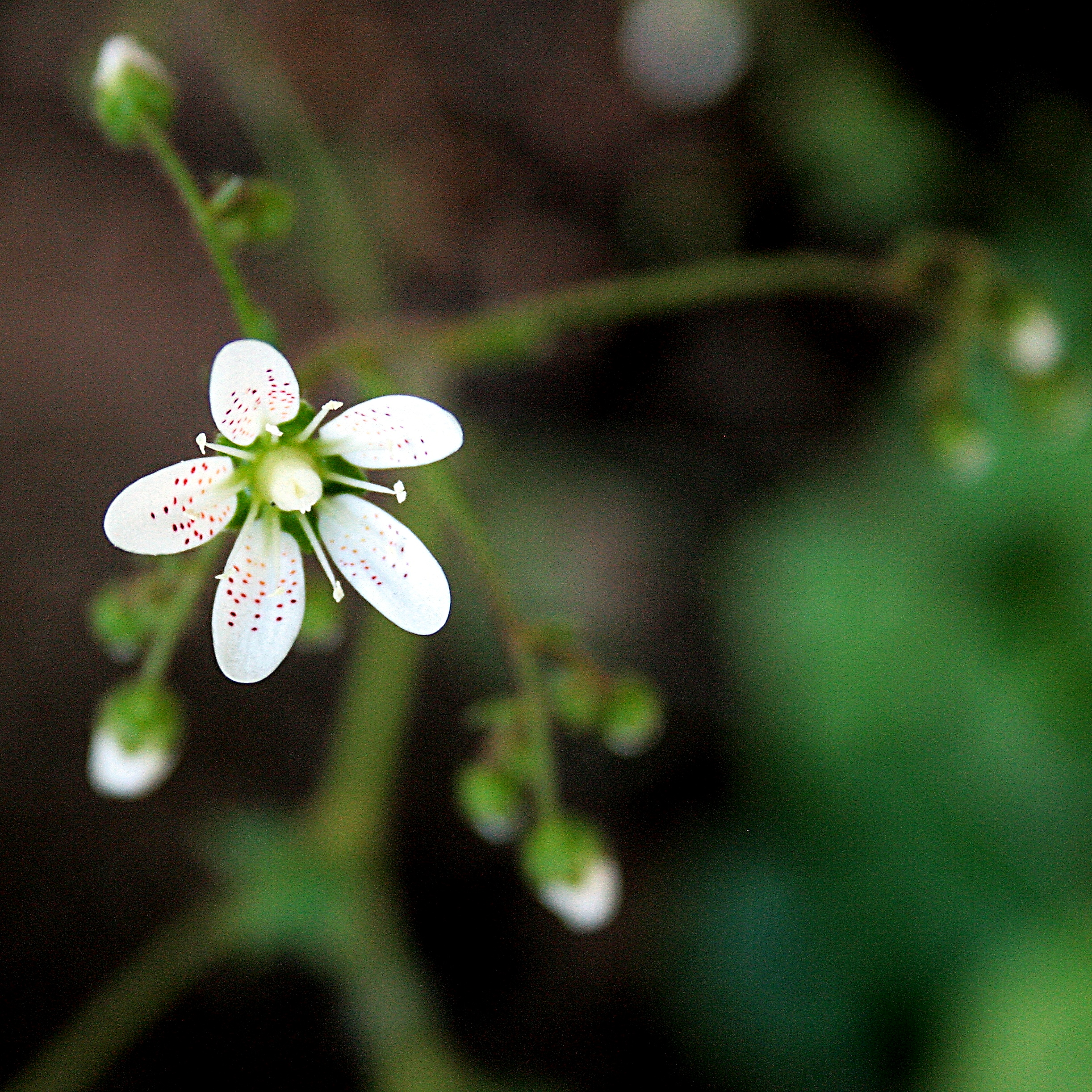 Ísland, Akureyri Botanical Gardens: Polar-Rundblättriger_Steinbrech_(Saxifraga_rotundifolia)